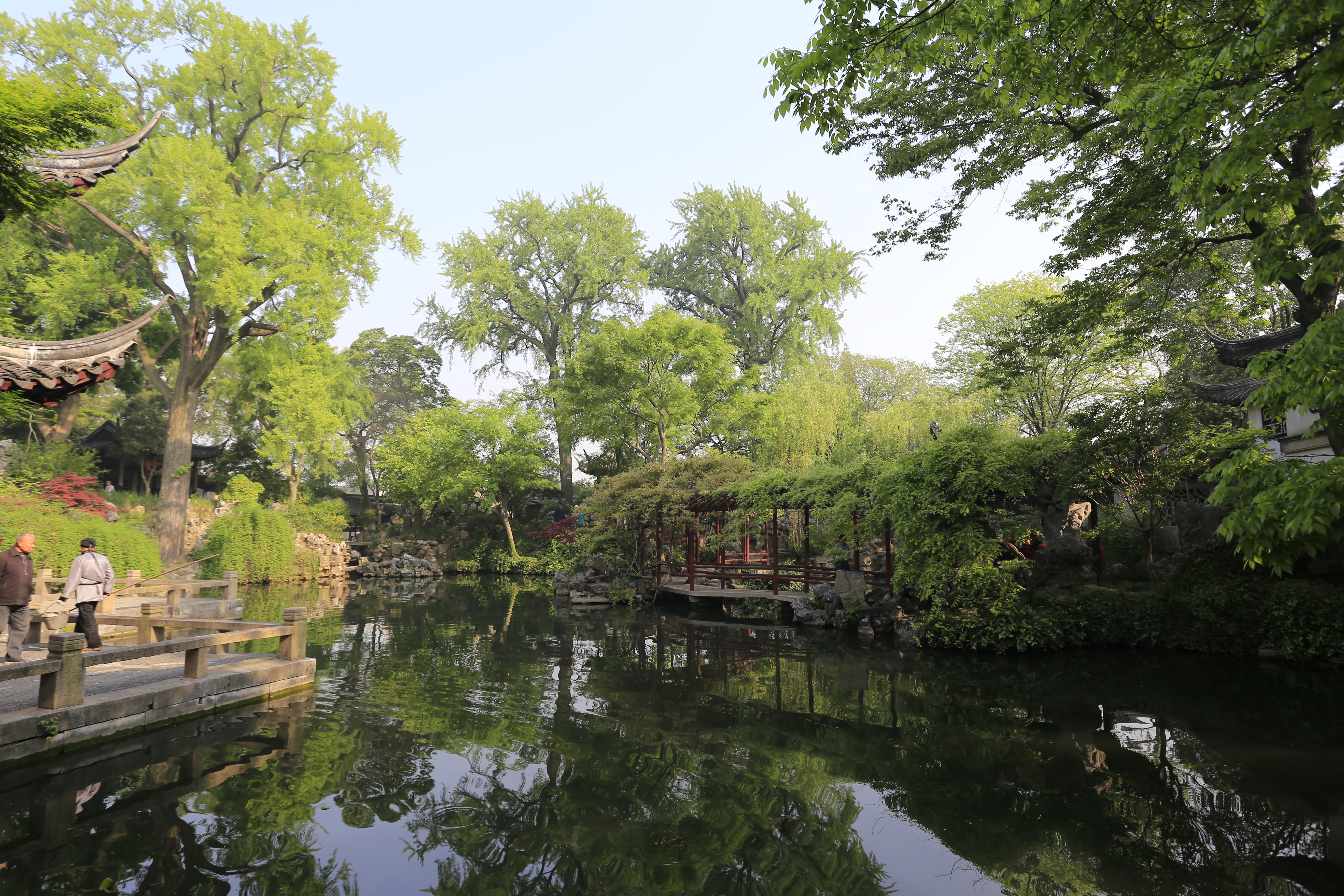 苏州留园—— 小蓬莱